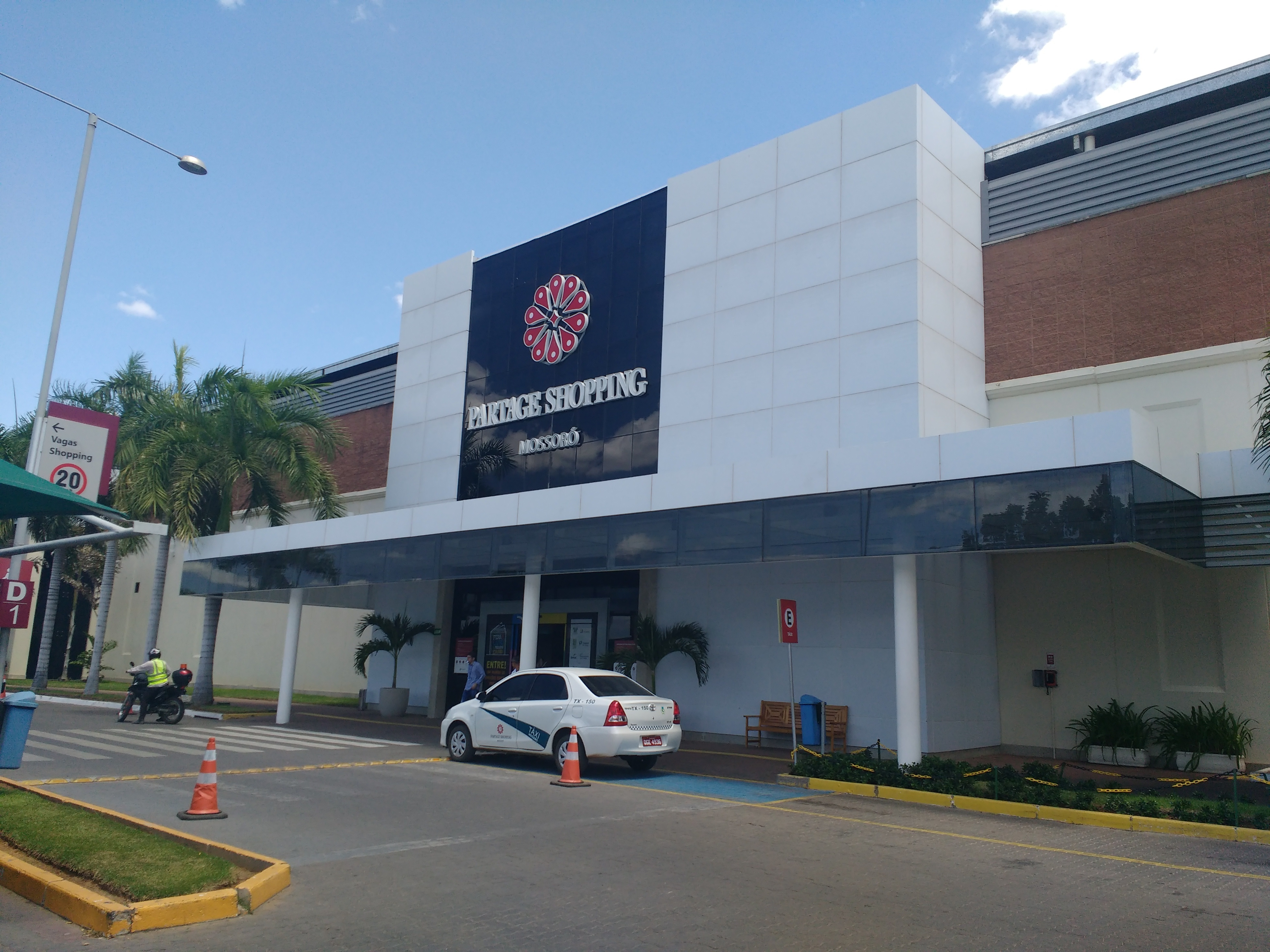 Entrada do Partage Shopping (antigo Mossoró West Shopping) em Mossoró, Rio Grande do Norte (Brasil)